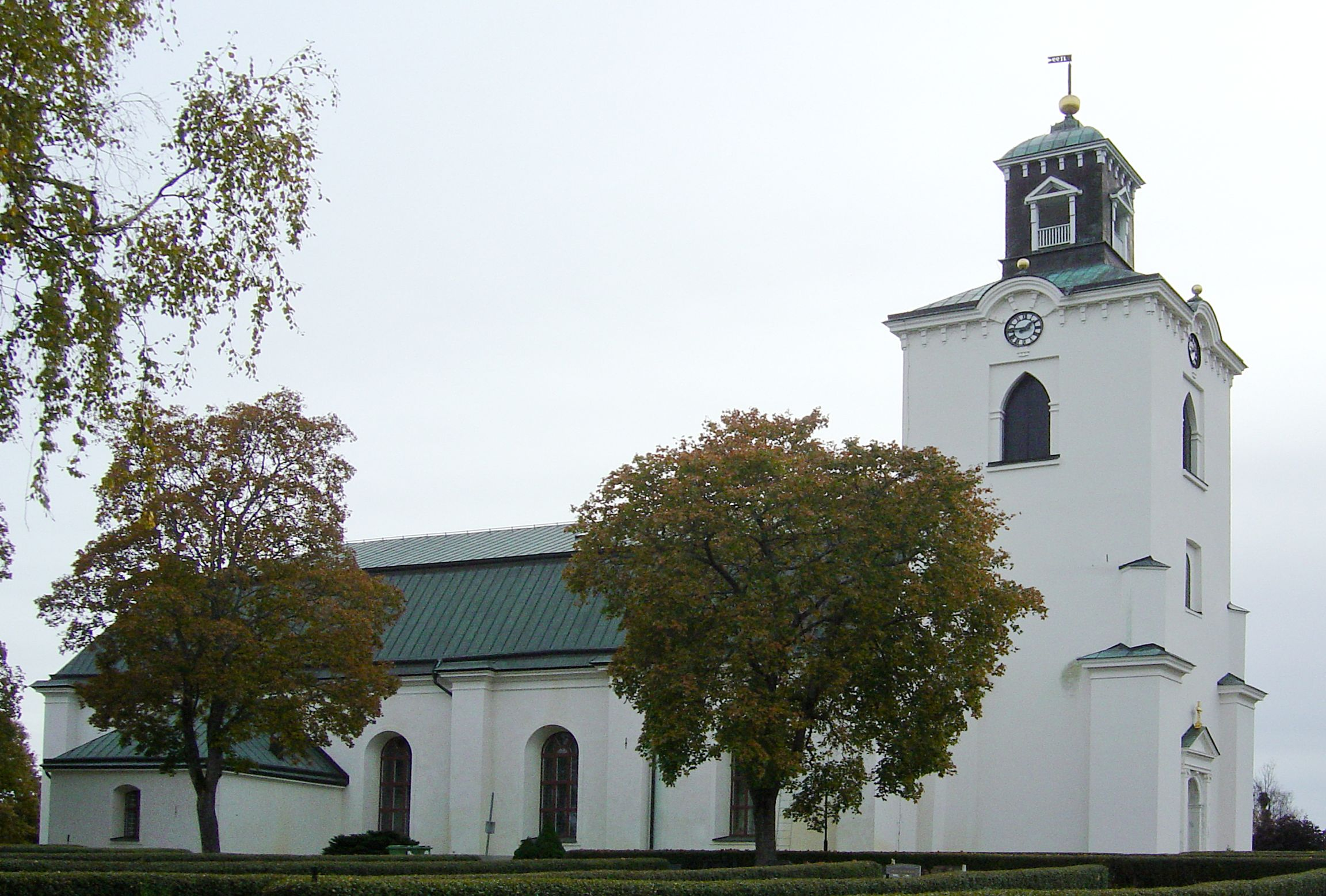 Alfta kyrka